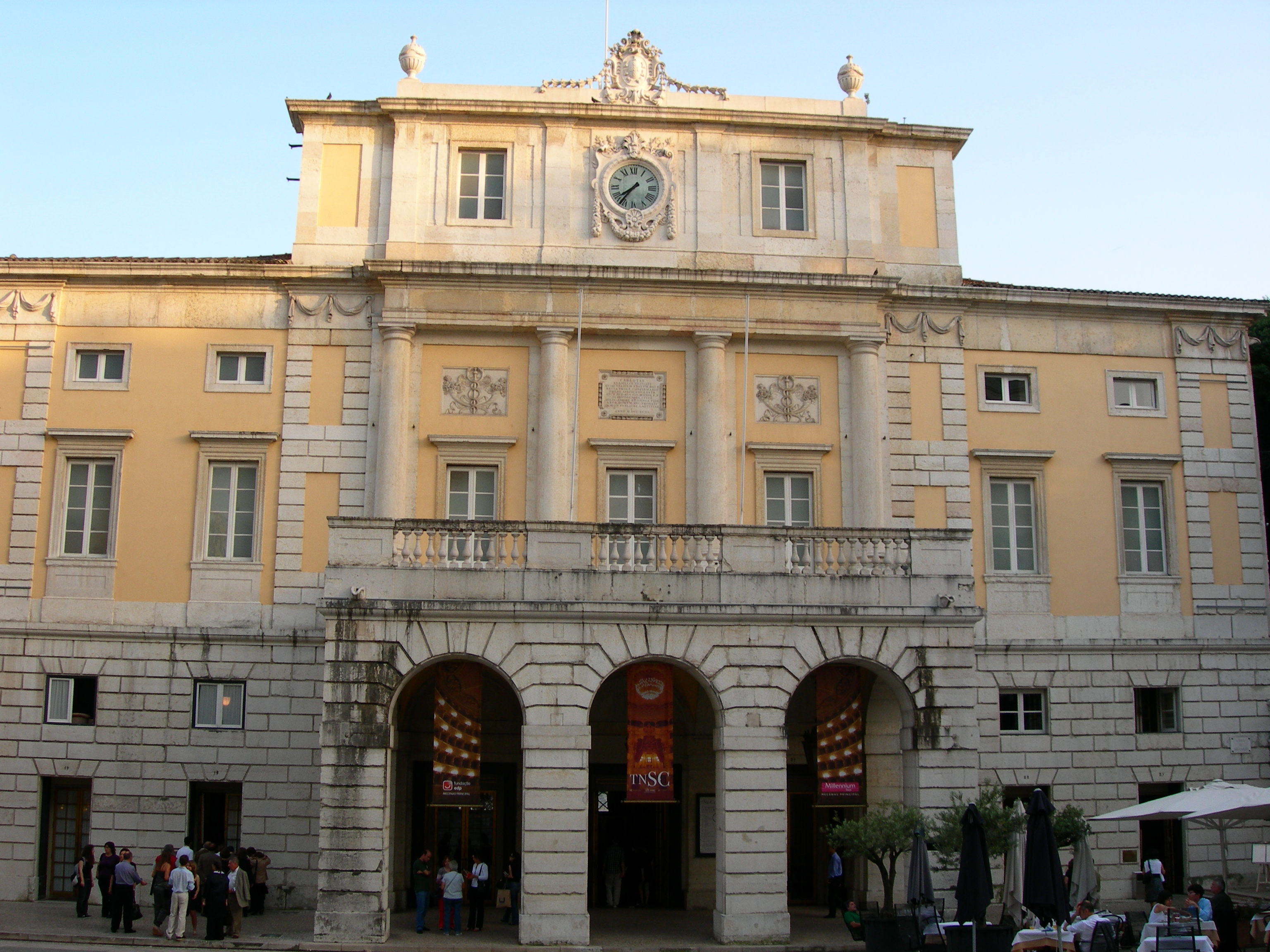 Teatro Nacional de São Carlos (Lisboa) This file was uploaded for Wiki Loves Monuments in Portugal with the unique identifier 71093.